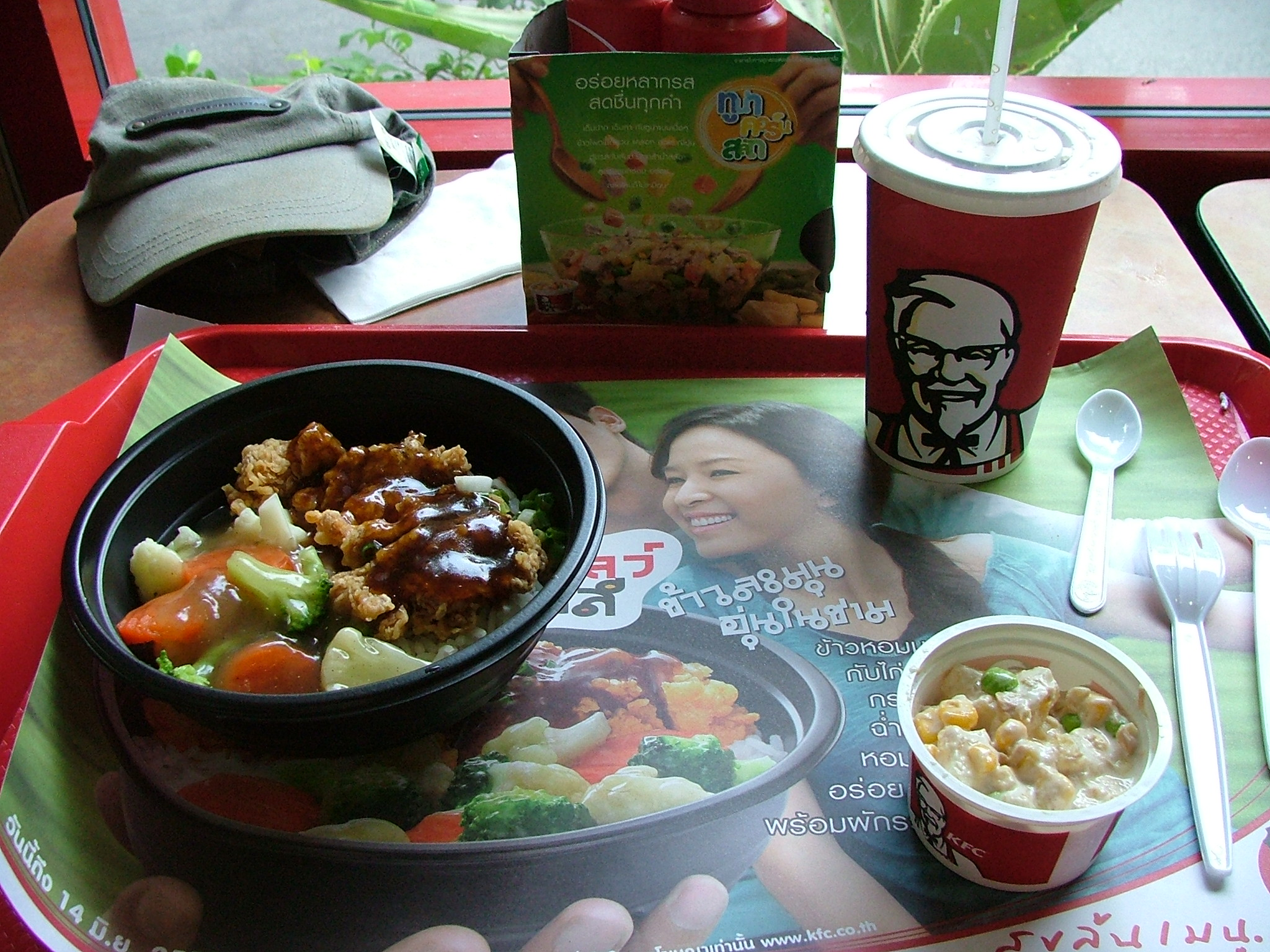 Dusit ZOO, Bangkok. Fast food.